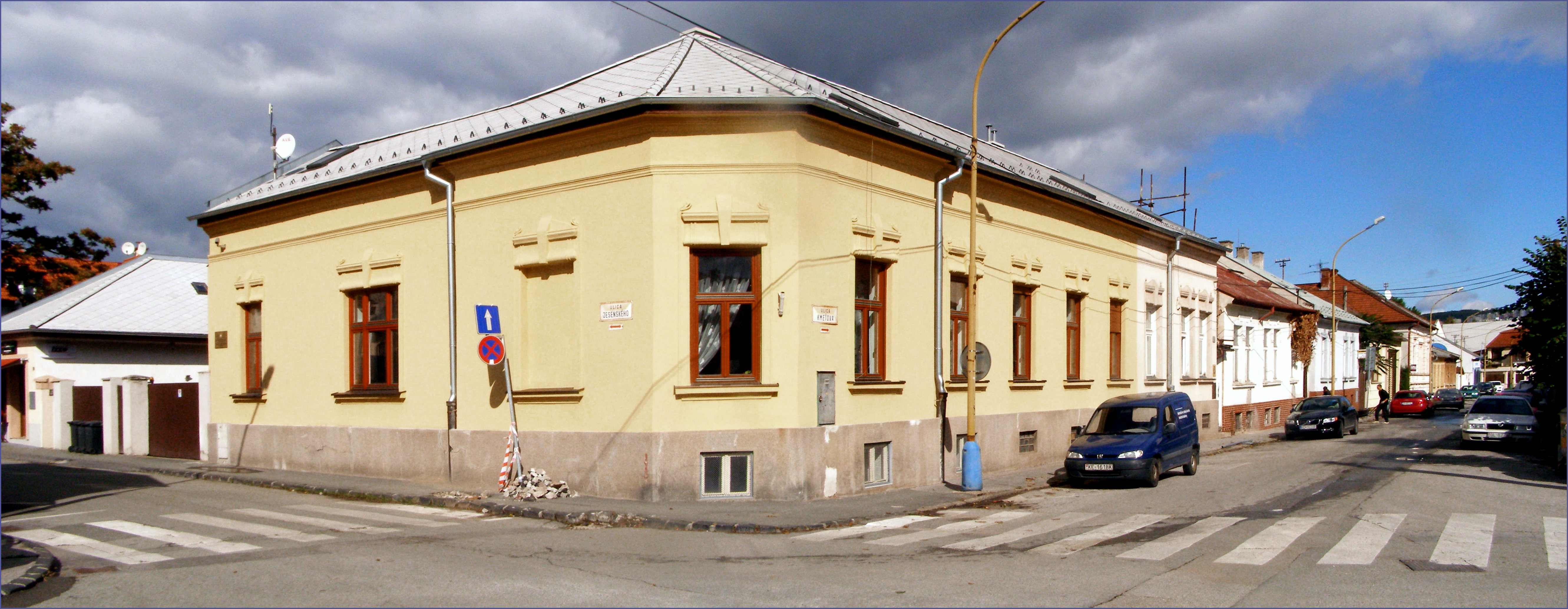 Srbský konzulát